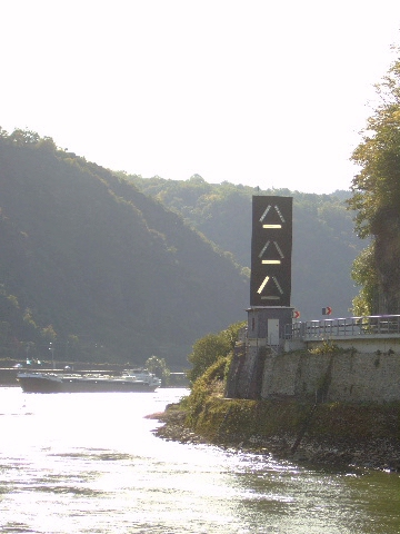 Wahrschau auf dem Rhein bei St. Goar (Loreley)